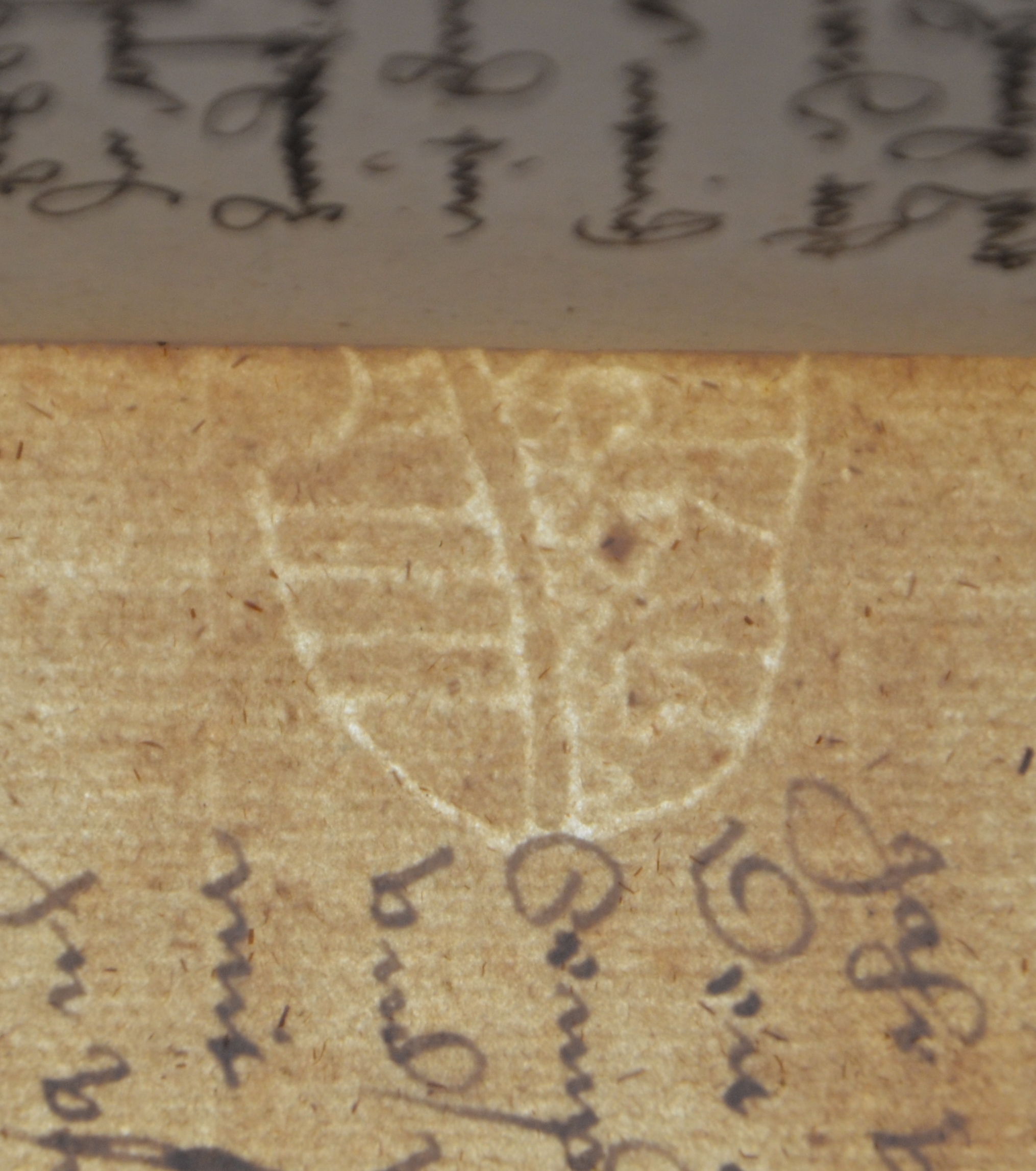 Wasserzeichen einer Papiermühle aus Dresden im frühneuzeitlichen Gemeindebuch Schrebitz.